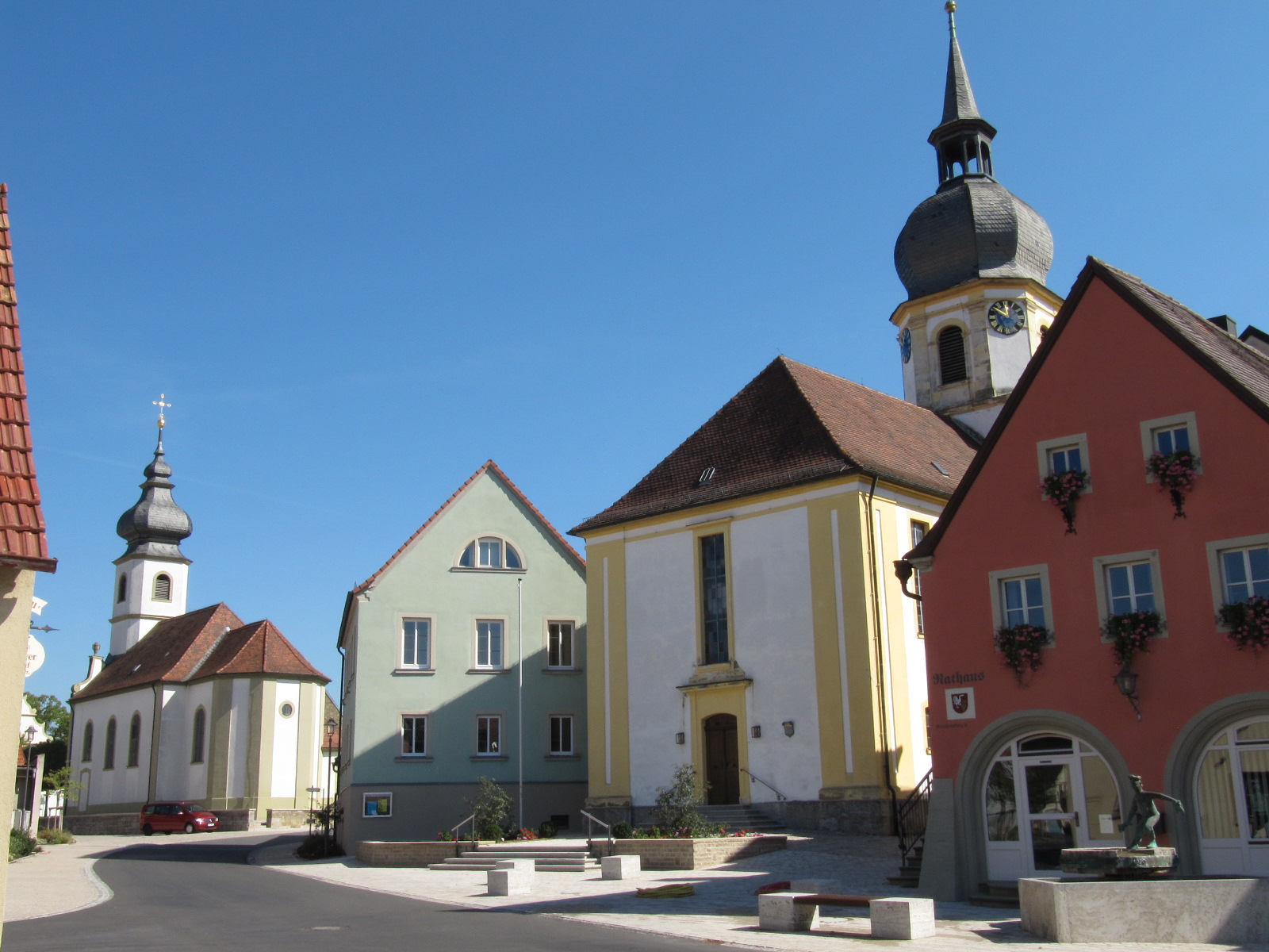 Rathaus umrahmt von den Ortskirchen